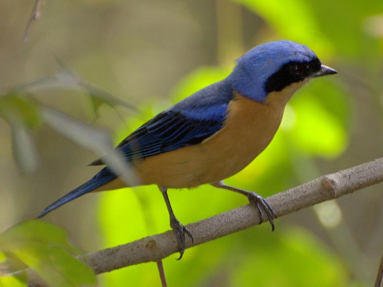 Fawn-breasted Tanager (Pipraeidea melanonota). Horto Florestal de São Paulo